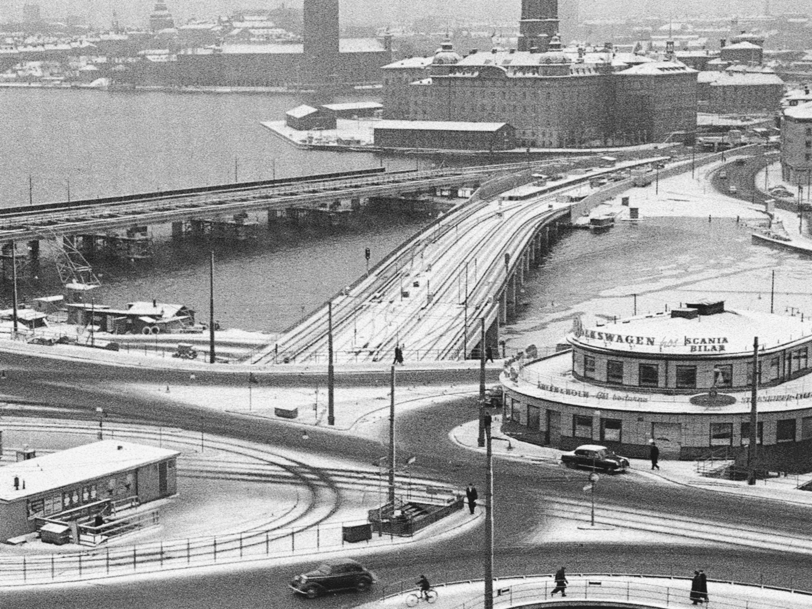 Söderströmsbron och Kolingsborg i december 1956